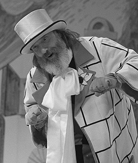 Pieke Dassen in de Nederlandse kinderserie De film van Ome Willem in 1981